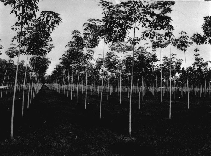 Foto. De overjarige cultures ter oostkust van Sumatra in woord en beeld. Door de A.V.R.O.S. eerbiedig opgedragen aan Z.E. den Gouverneur-Generaal van Nederlandsch-Indië Mr. D. Fock. Driejarige Hevea-aanplant op een rubberonderneming te Bandar Negri